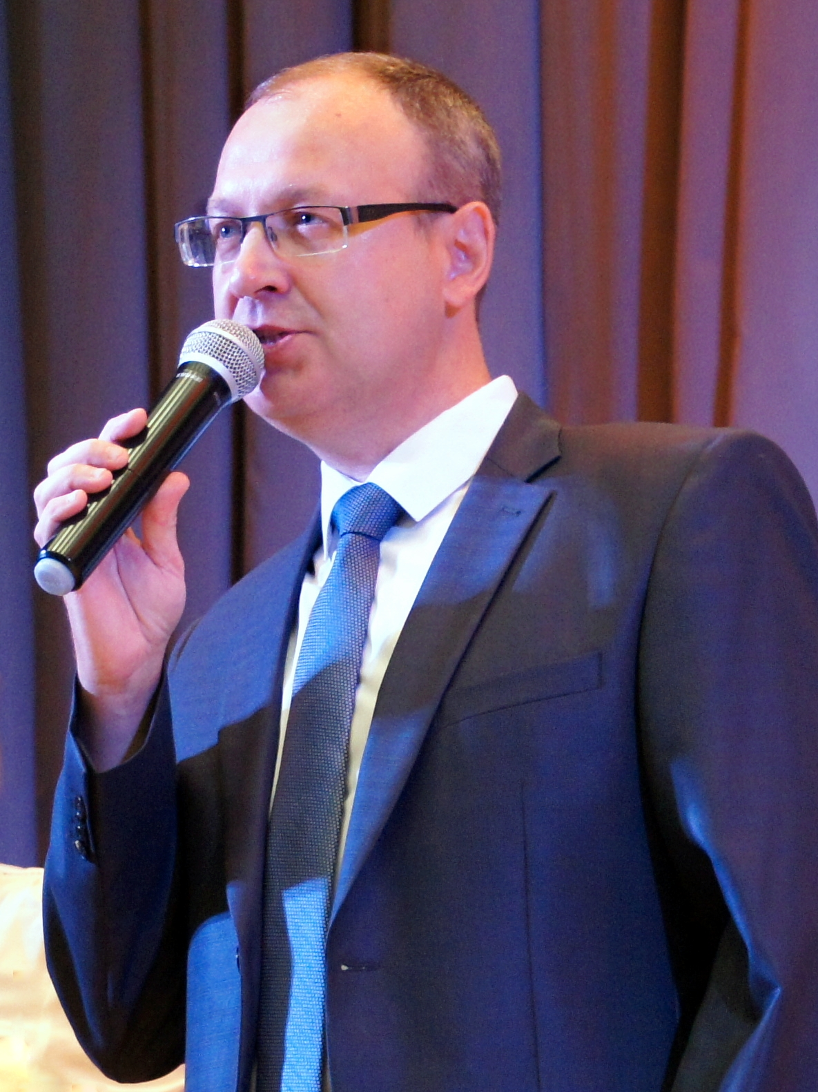 Сергей Сергеевич Сехин - директор московской школы 1535, 2018 г.